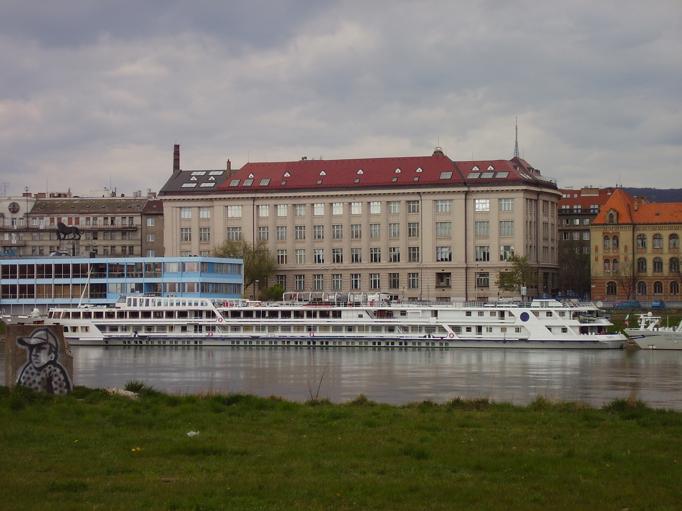 Bratislava riverfront